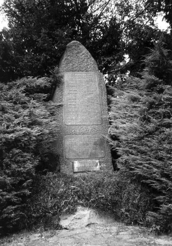 Denkmal für die 1849 standrechtlich Erschossenen im Alten Friedhof (heute Kreiskrankenhaus)